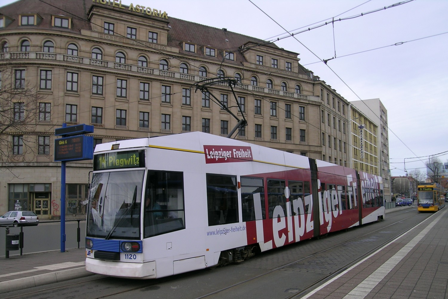 NGT8D an der Haltestelle Hauptbahnhof-West in Leipzig